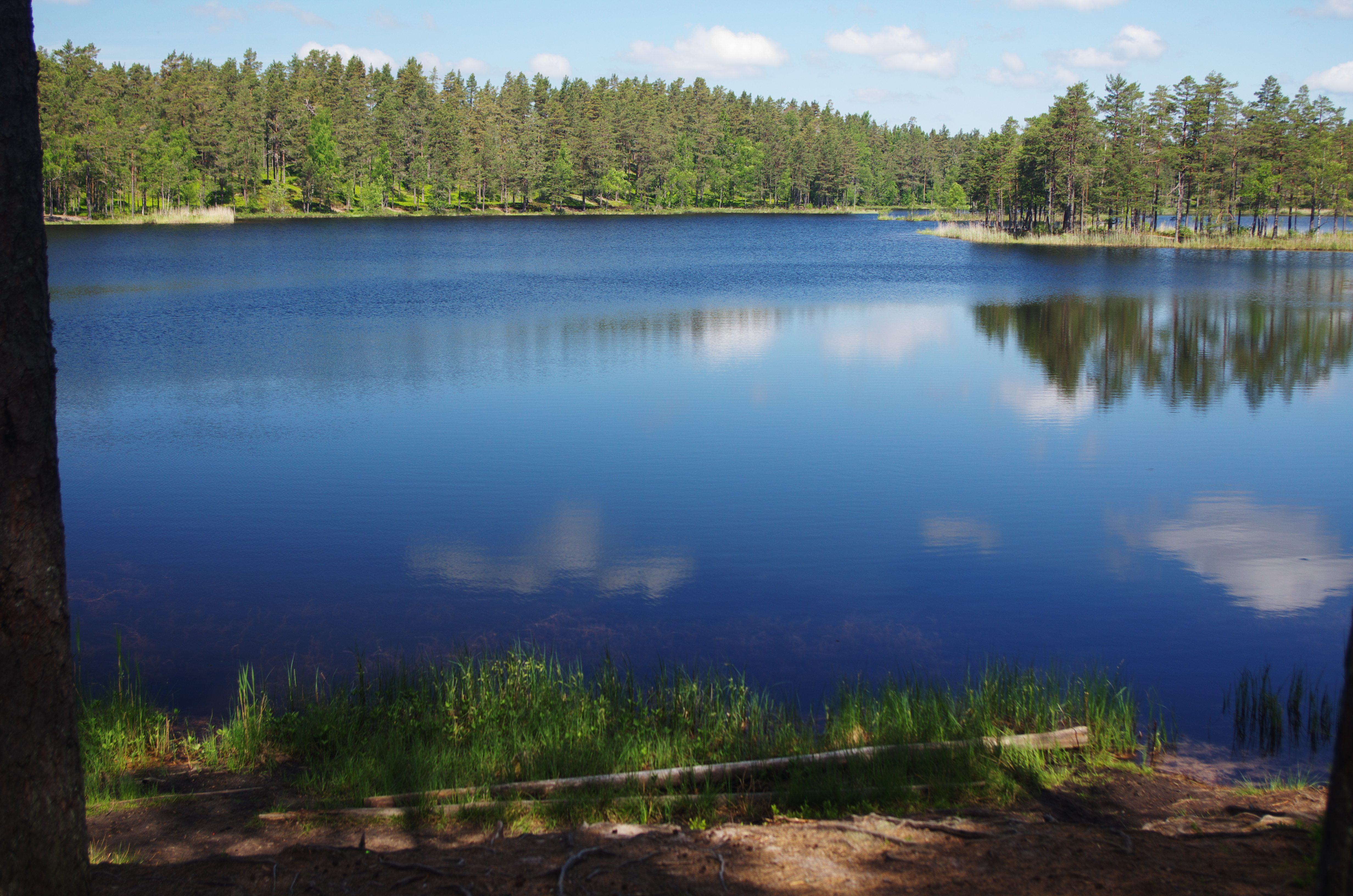 Stora Öjasjön eller Store Öjasjön är en fiskesjö på Hökensås i Tidaholms kommun i Västergötland i Sverige.